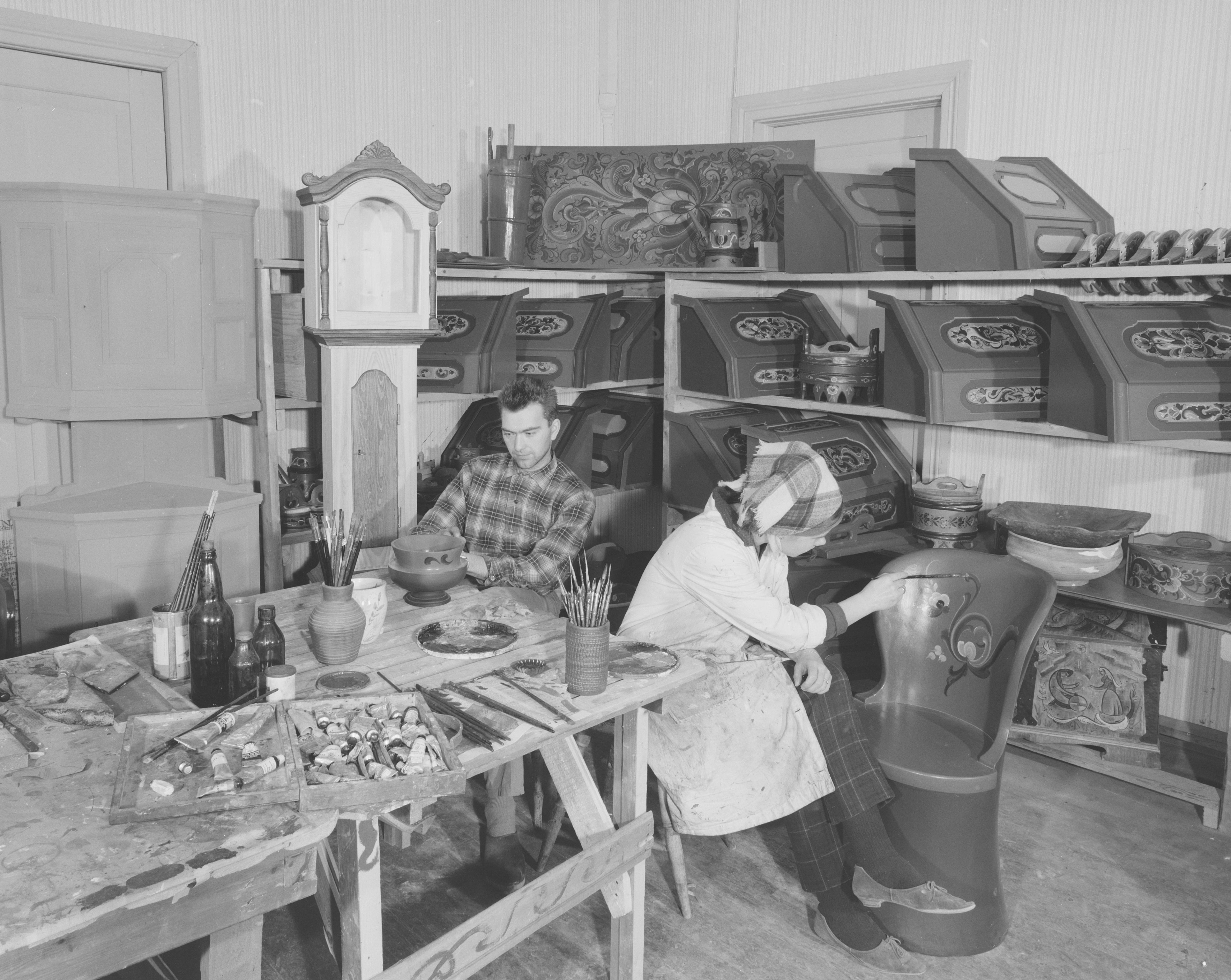 Bildet er hentet fra Nasjonalbibliotekets bildesamling Valdres, Oppland